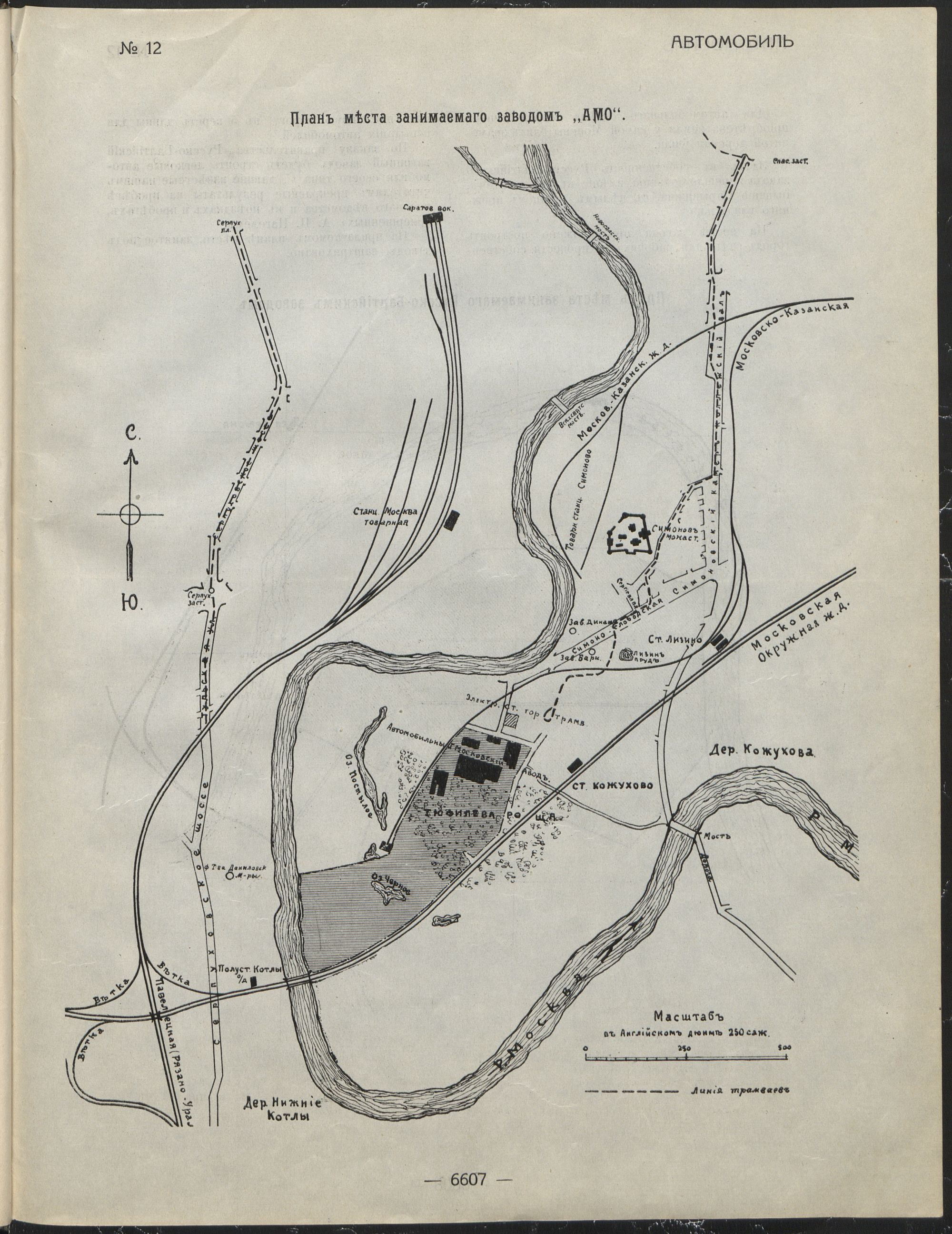 План автомобильного завода АМО (ЗиЛ), 1916.